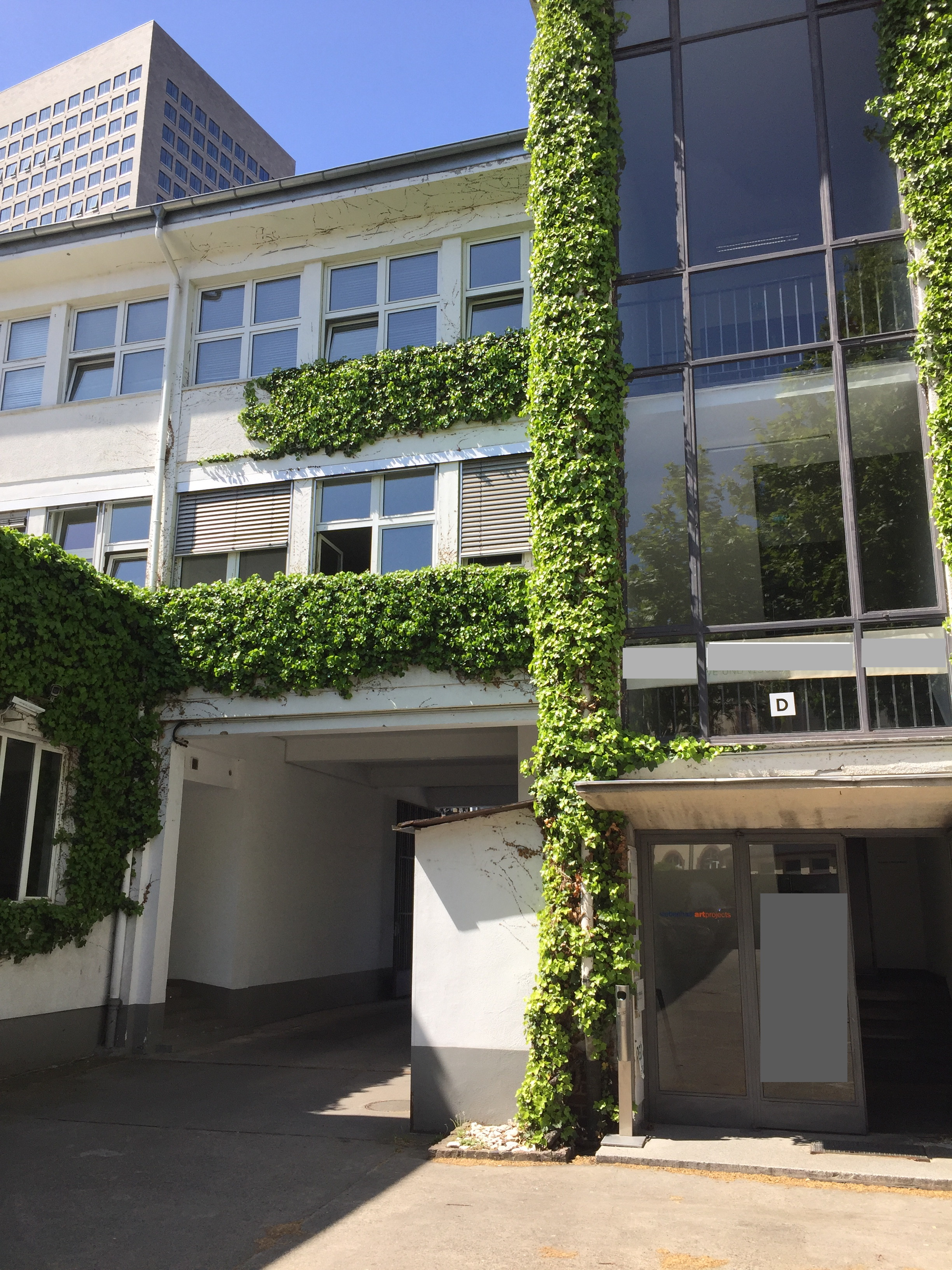 In diesem Gebäude im ersten Stock in der Hamburger Allee 45 waren die ersten Räume der Frankfurter Frauenschule.